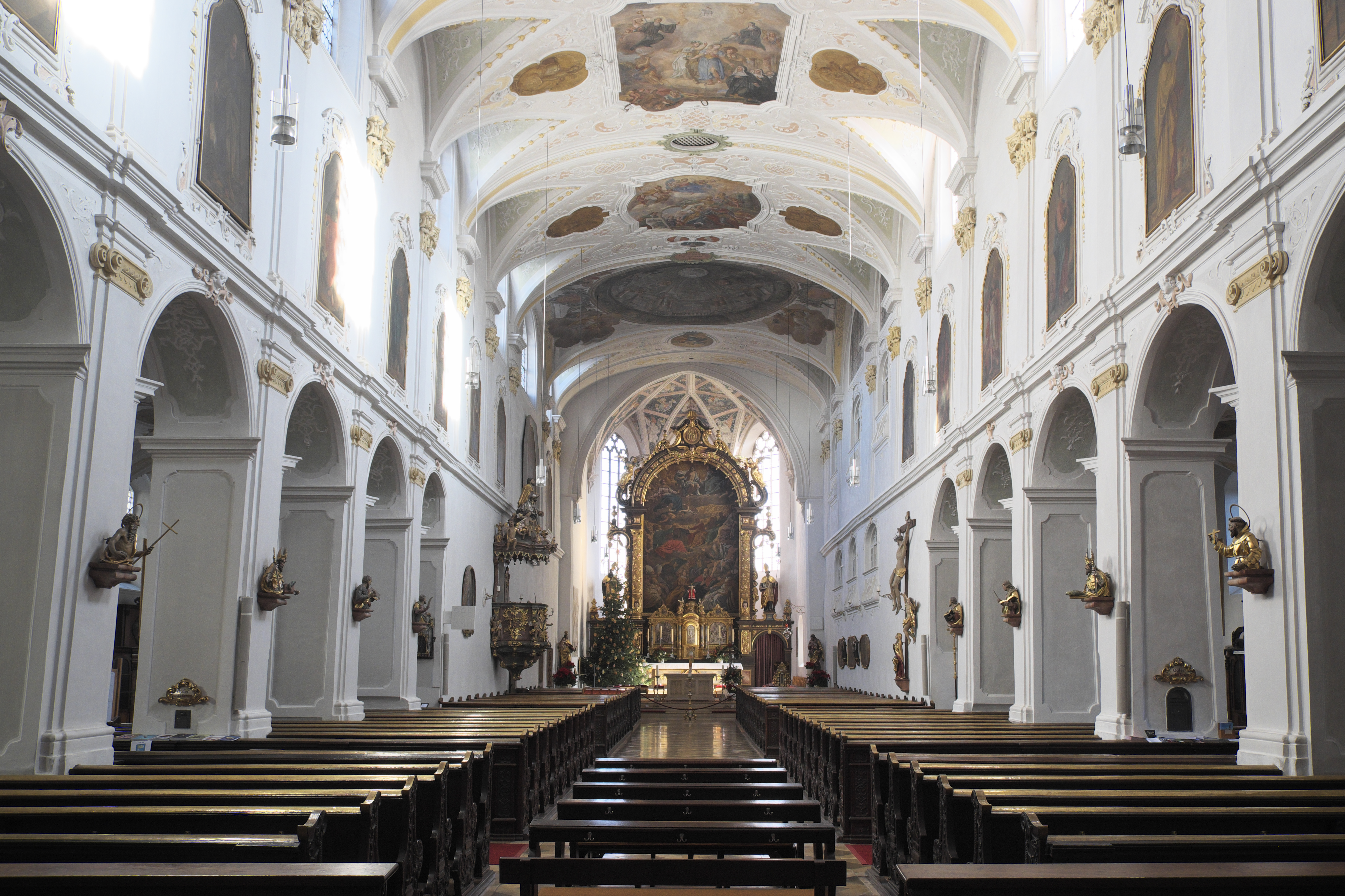 Katholische Pfarrkirche St. Emmeram, ehemalige Benediktinerinnen-Klosterkirche Mariä Himmelfahrt, in Geisenfeld im Landkreis Pfaffenhofen an der Ilm (Bayern/Deutschland), Langhaus und Chor